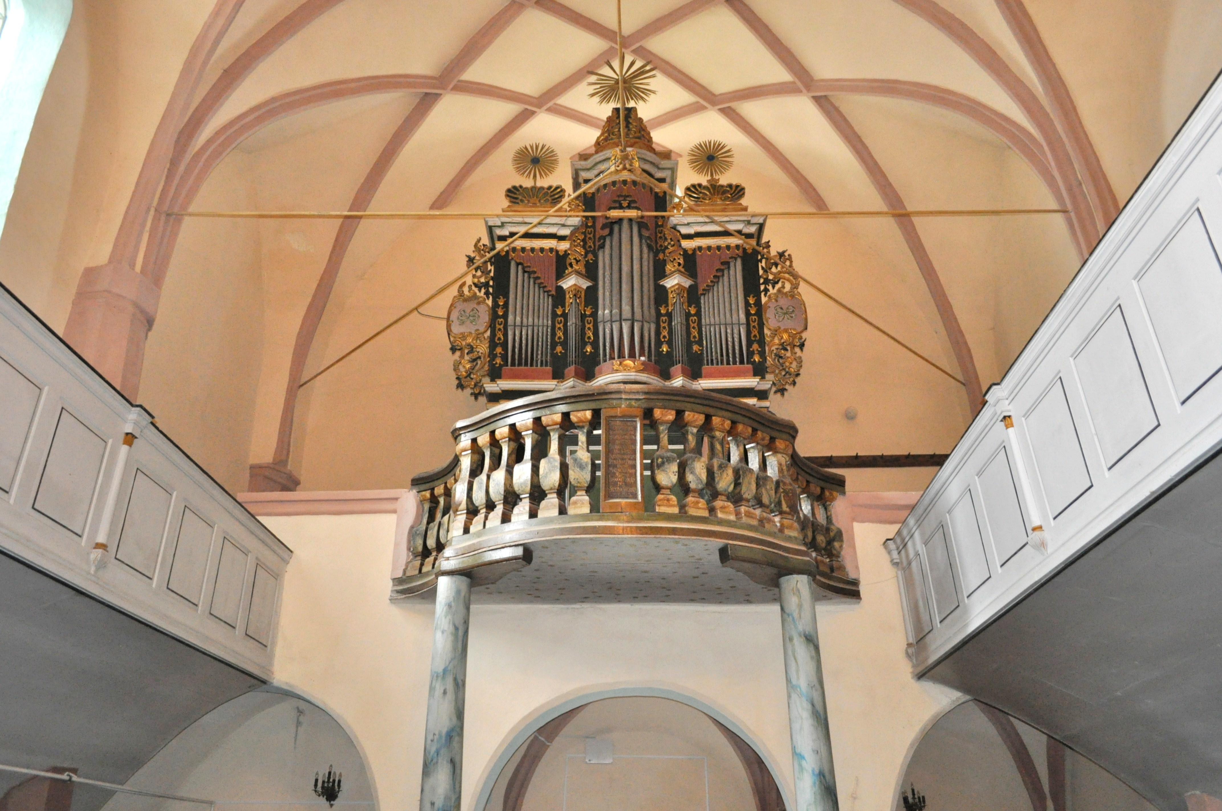 Biserica evanghelică fortificată, sat BAZNA; comuna BAZNA, județul Sibiu 01